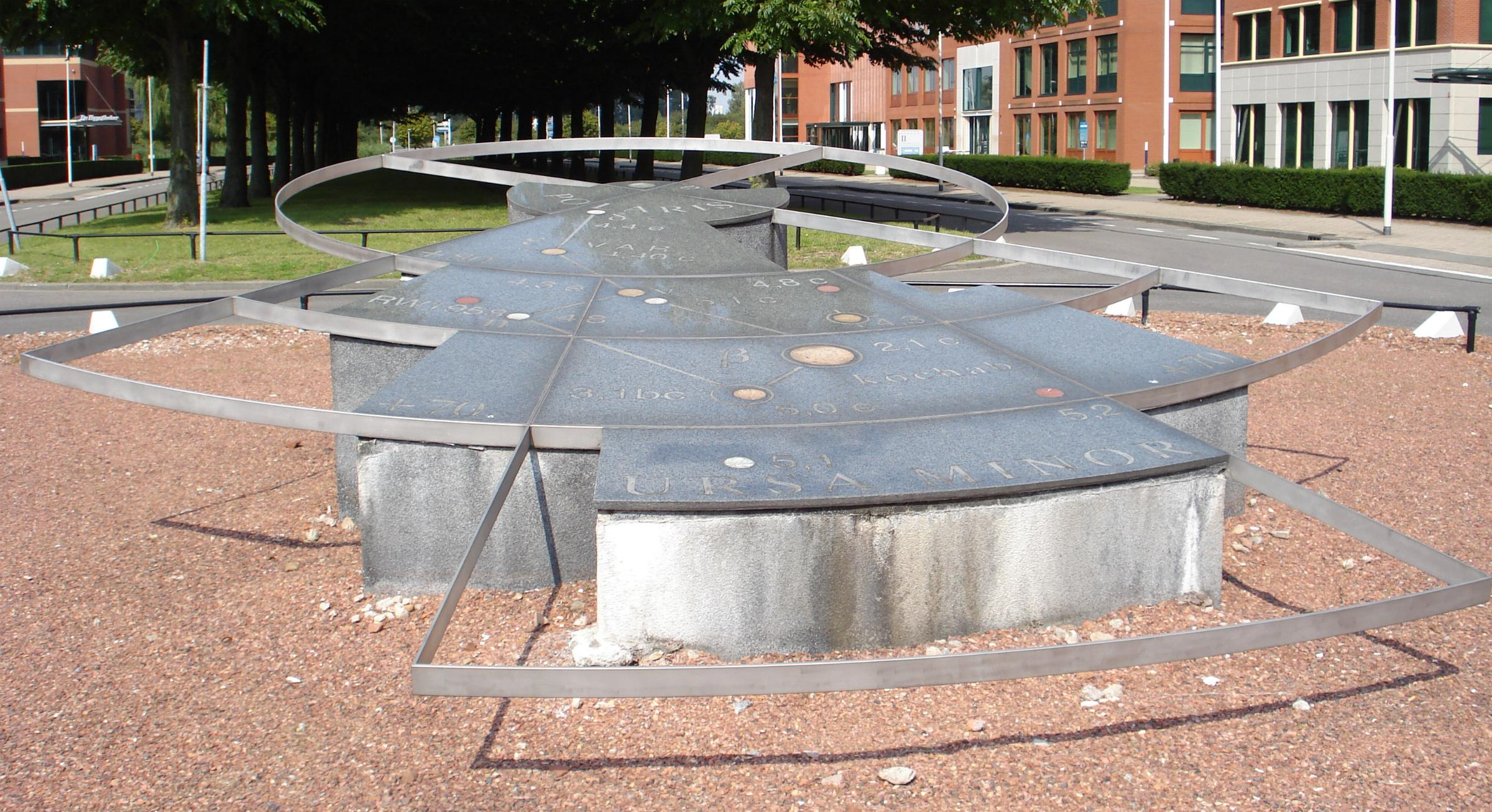 Rotterdam Brainpark, Lichtenauerweg. Kunstwerk "Polaris&Octans" van Marinus Boezem. Rotterdam/The Netherlands.